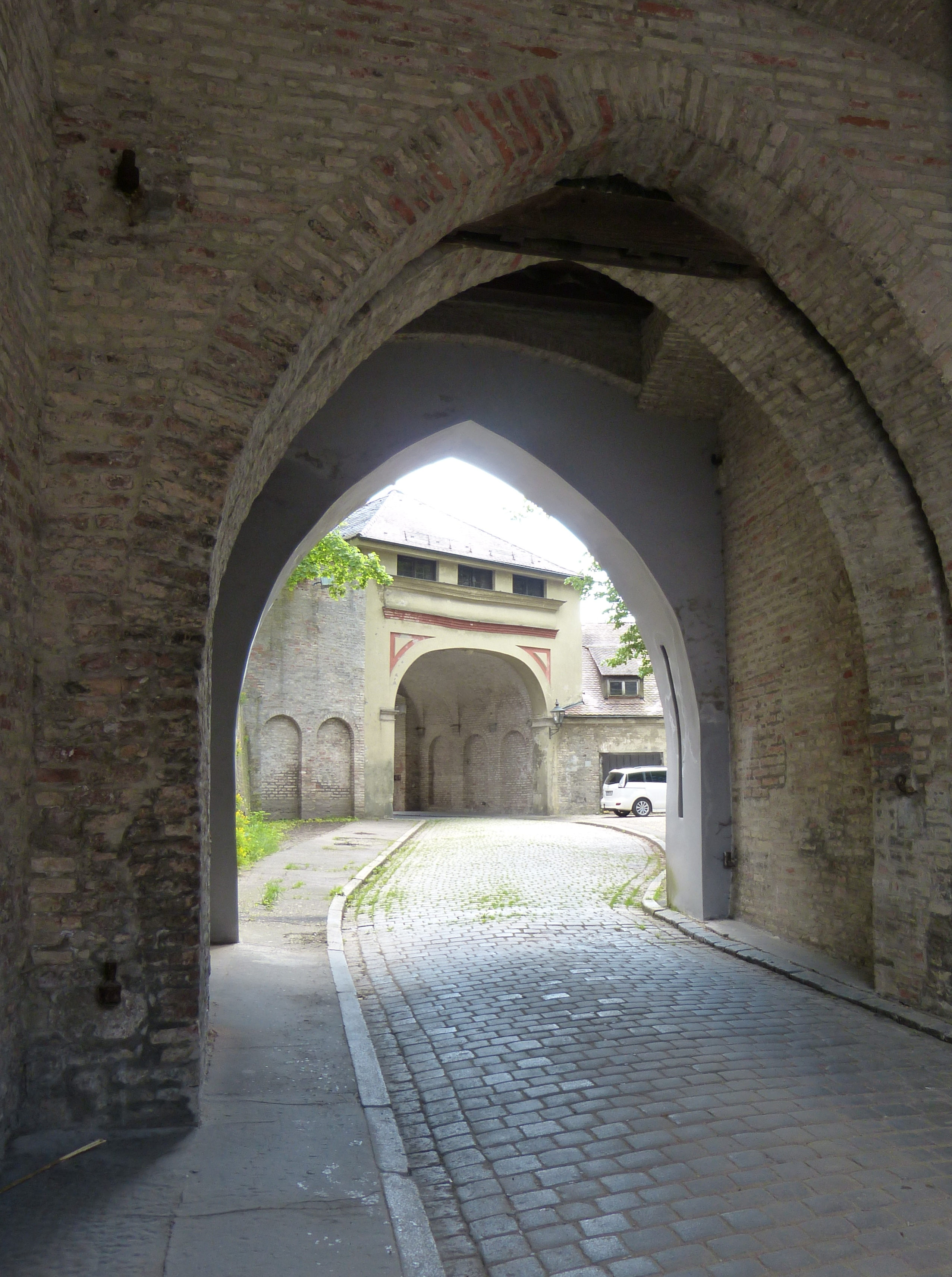 Augsburg, Blick durch das Rote Tor auf das Vortor.